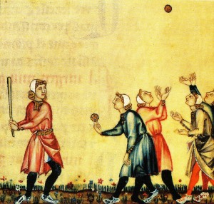 Xogo da pelota, Cantigas de Santa María.